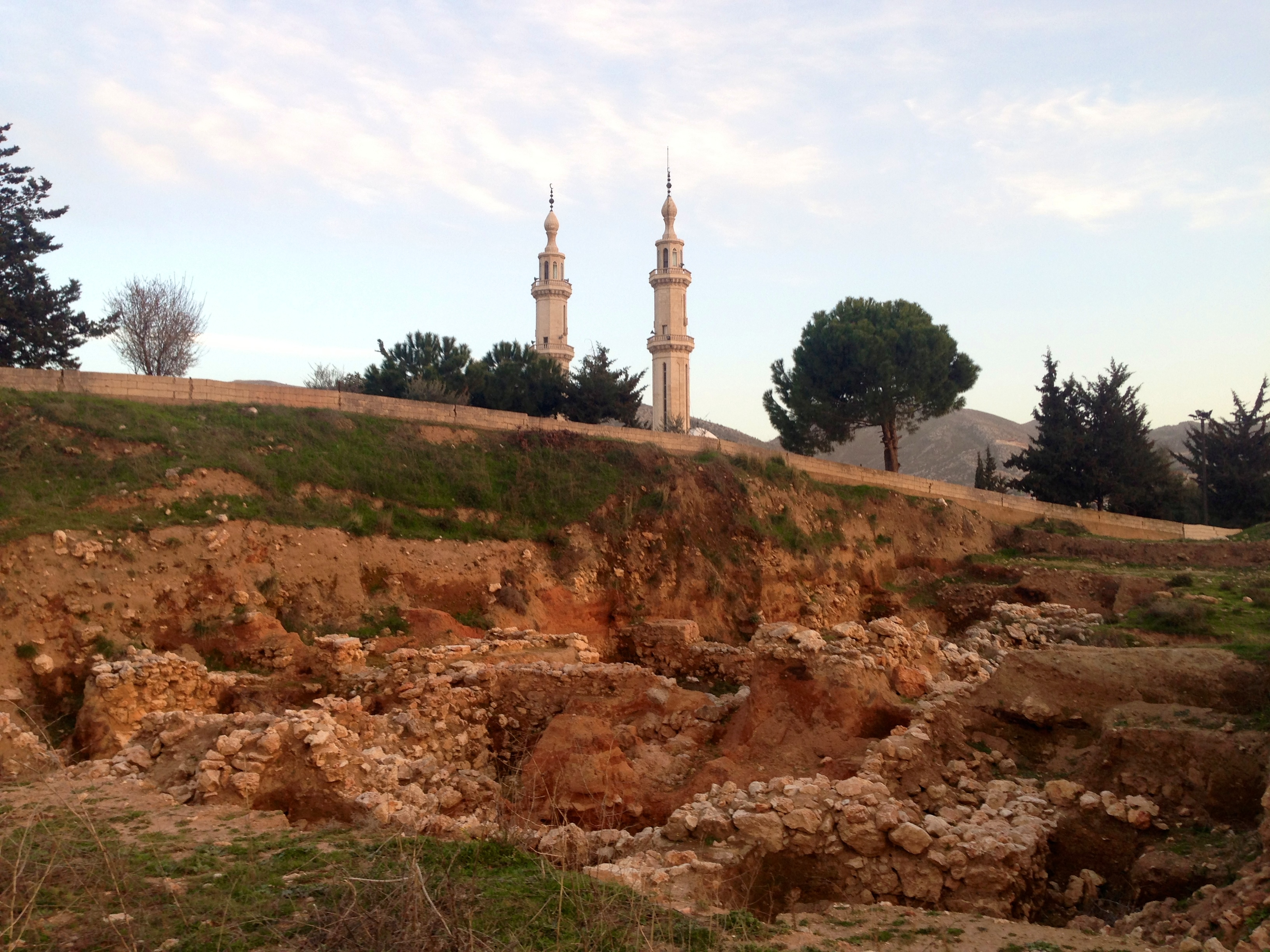 Ausgrabungen hinter der Moschee in Kamed El-Laouz